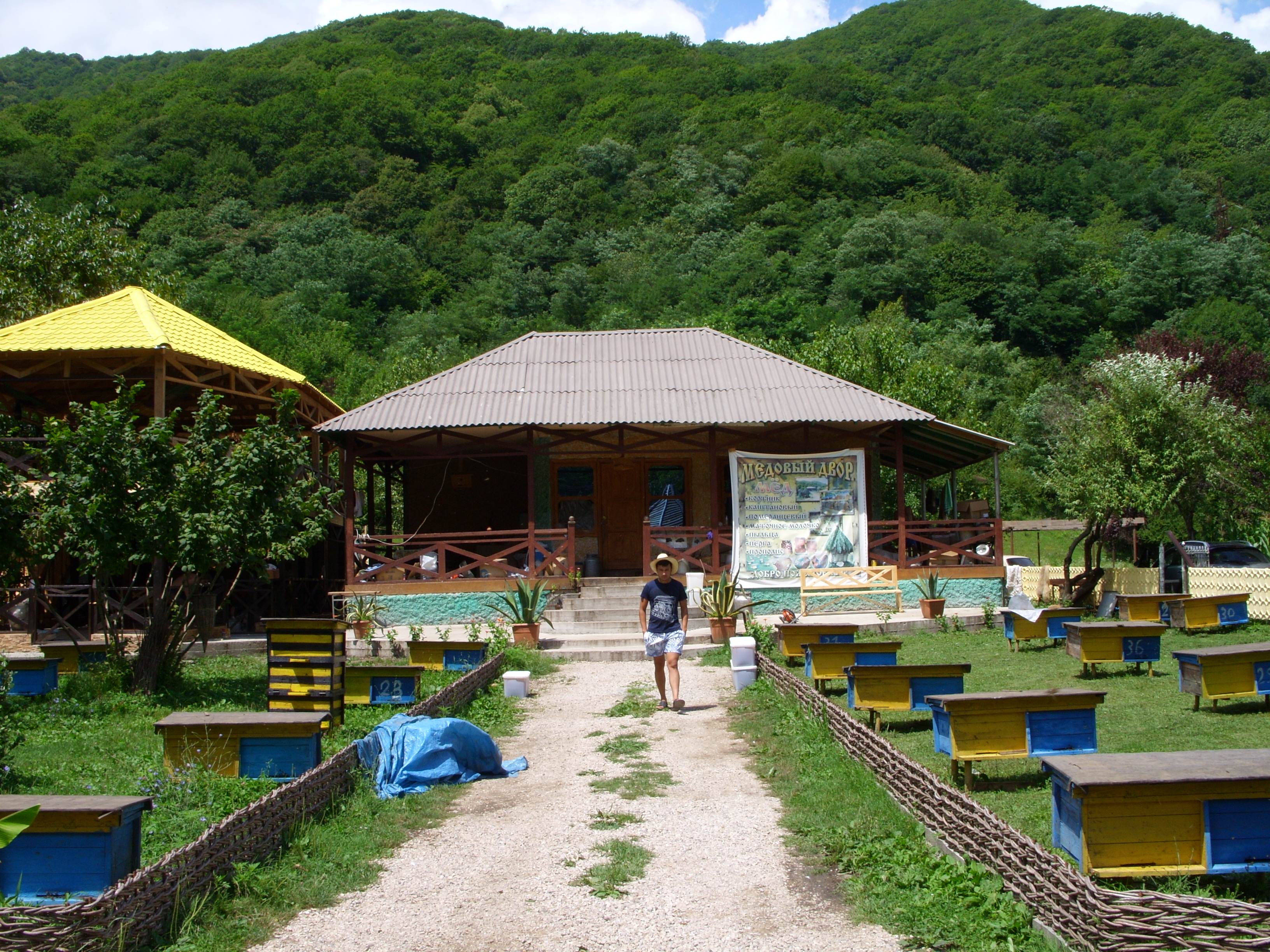 Абхазия, Гагрский район, 13 км к северу от Пицунды. Снимок июля 2009 г. Автобусная экскурсия из Сочи